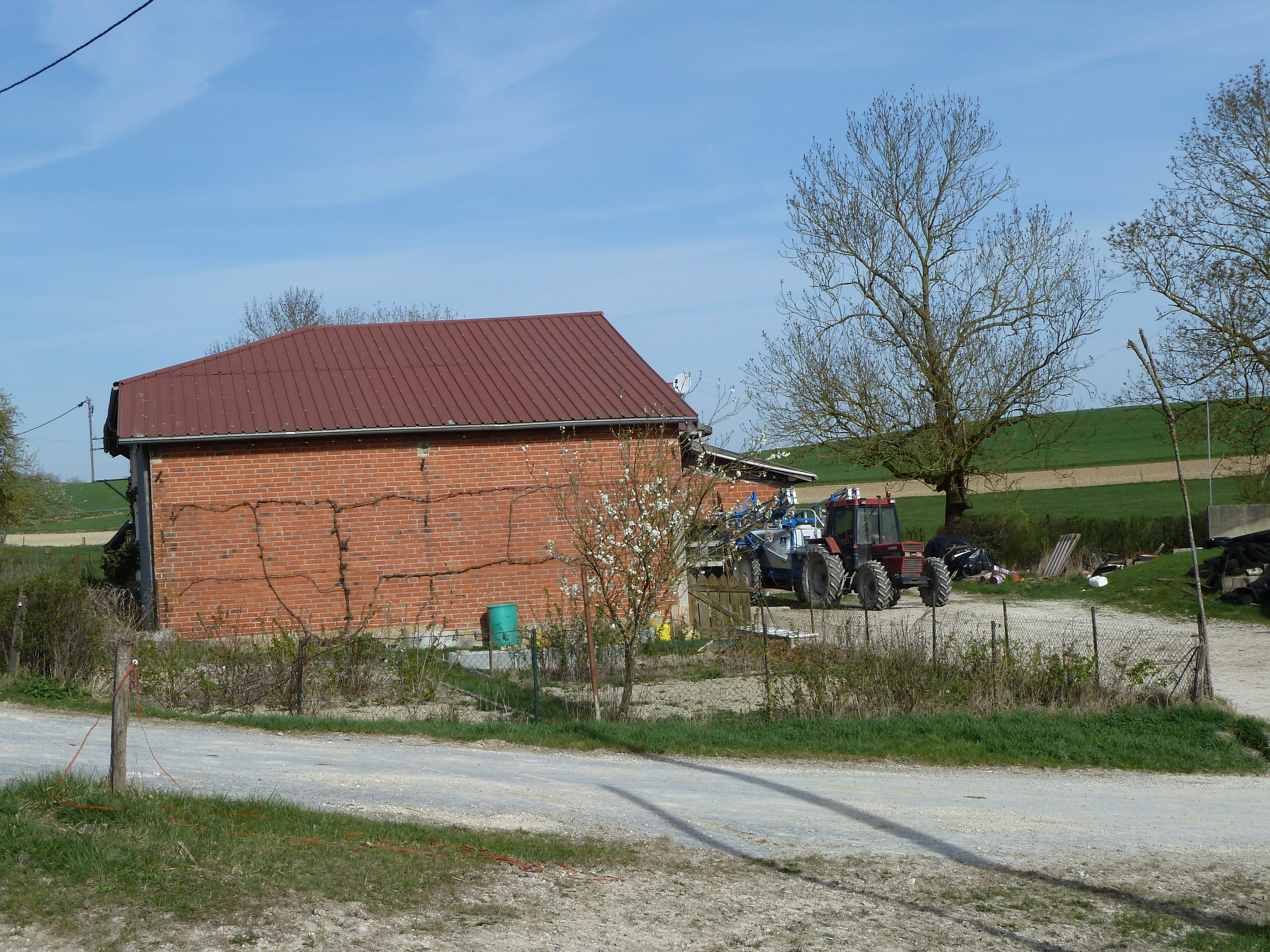 Noirlieu 51 Ferme de la Maison Rouge, au bord de la route D994 - localisation : 48.919722, 4.810289. Le toponyme de "Maison Rouge" est caractéristique des voies romaines.